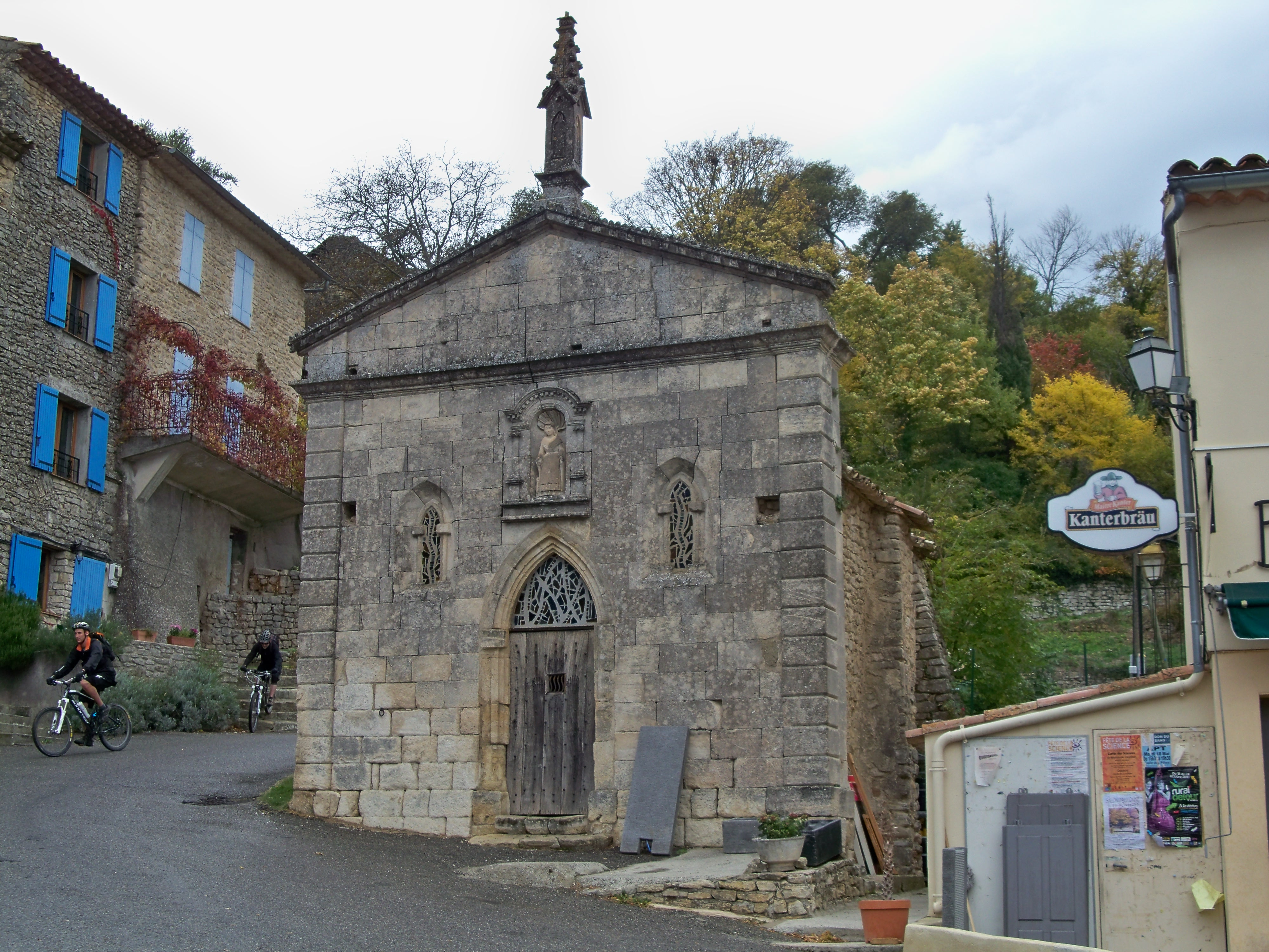 Chapelle à Saint Martin de Castillon (Vaucluse, France)